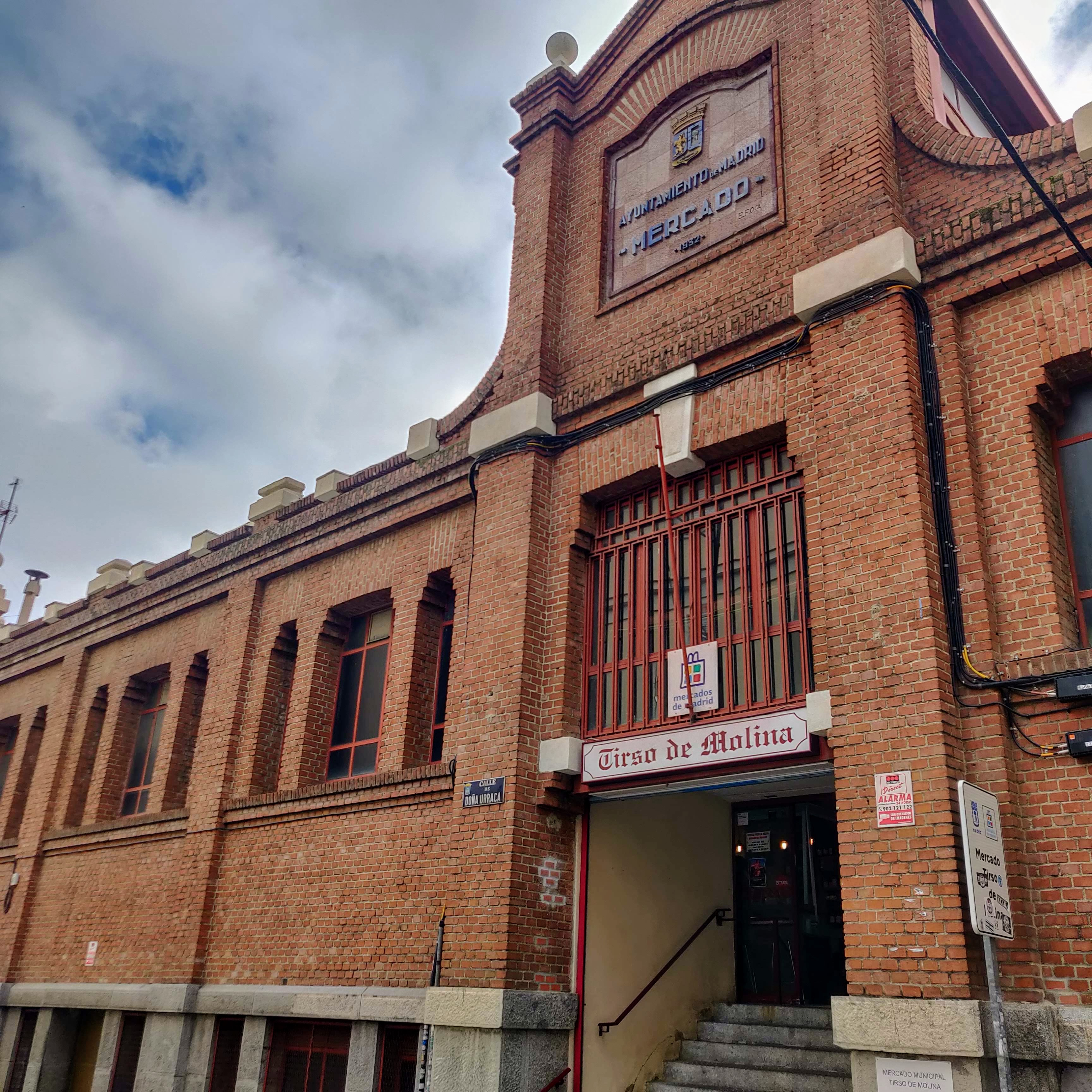 Fachada exterior del mercado Tirso de Molina, en Puerta del Ángel